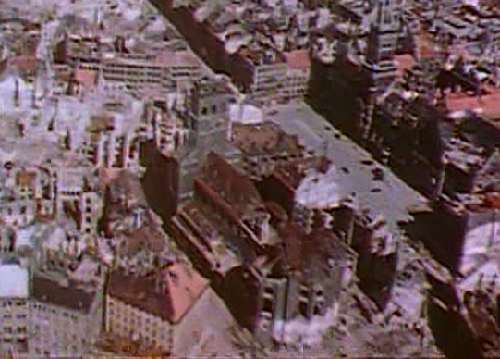 Die schwer beschädigte Pfarrkirche St. Peter in München.